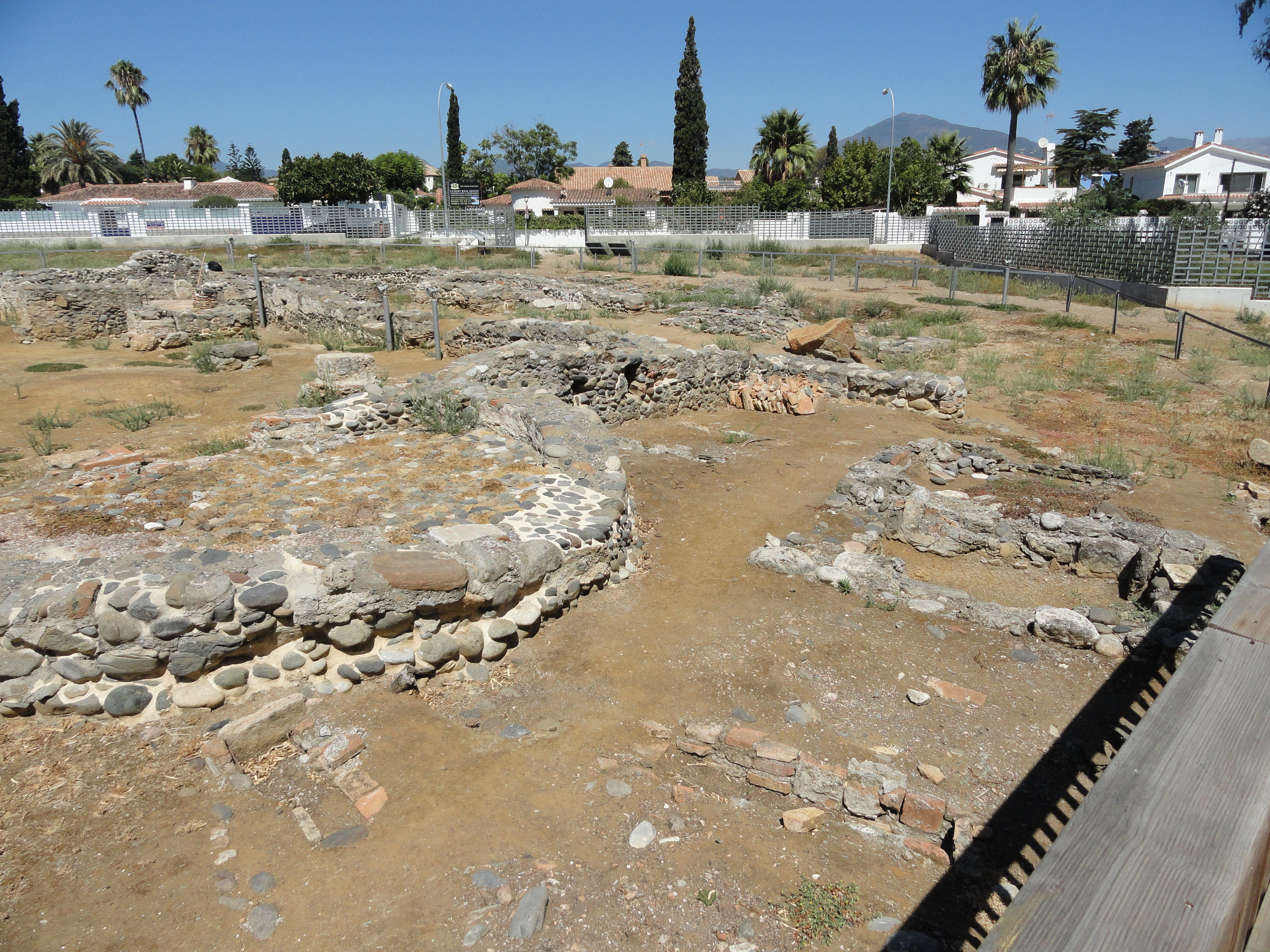 Basílica Paleocristiana de Vega del Mar